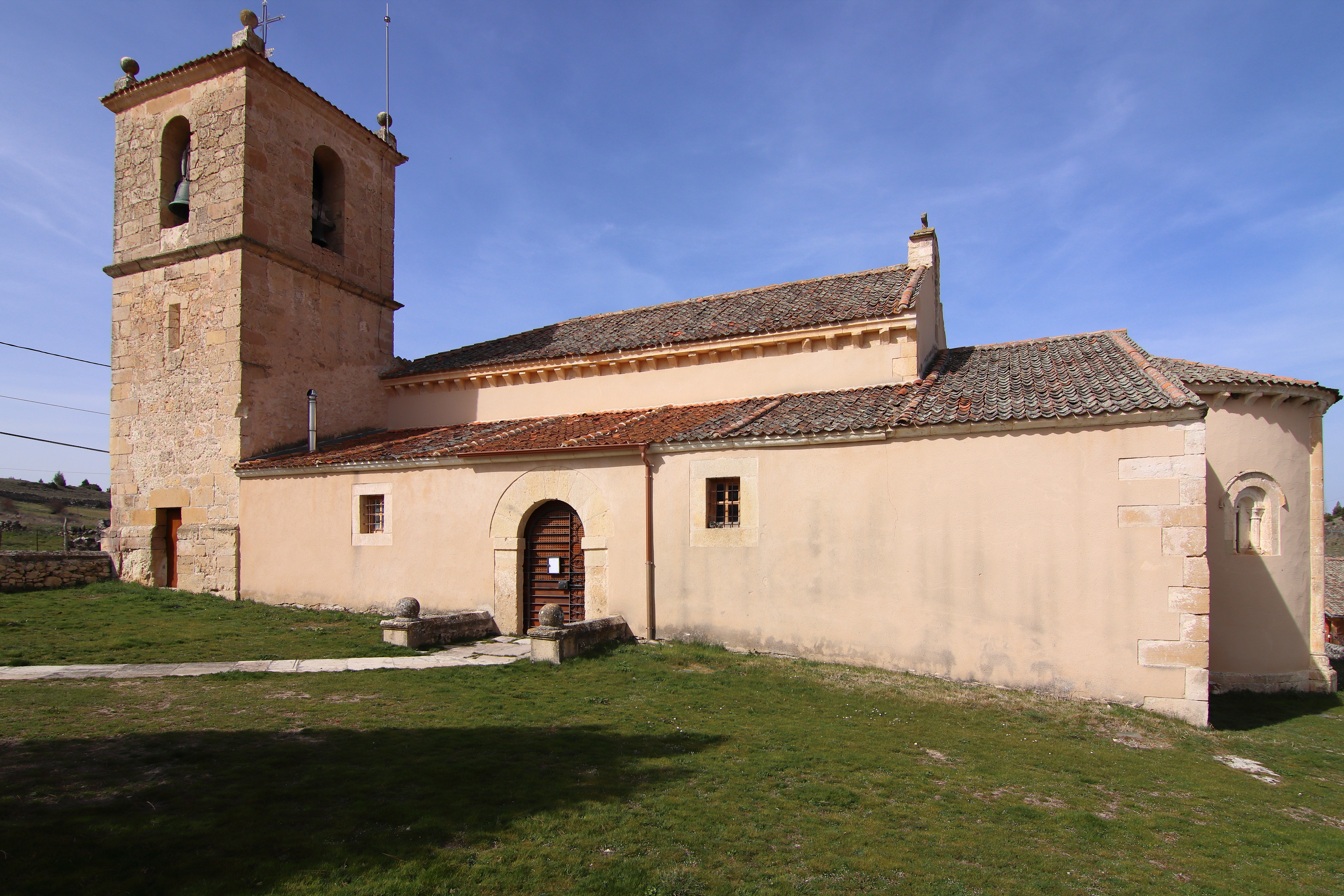 Iglesia de San Juan, Cubillo, fachada princial